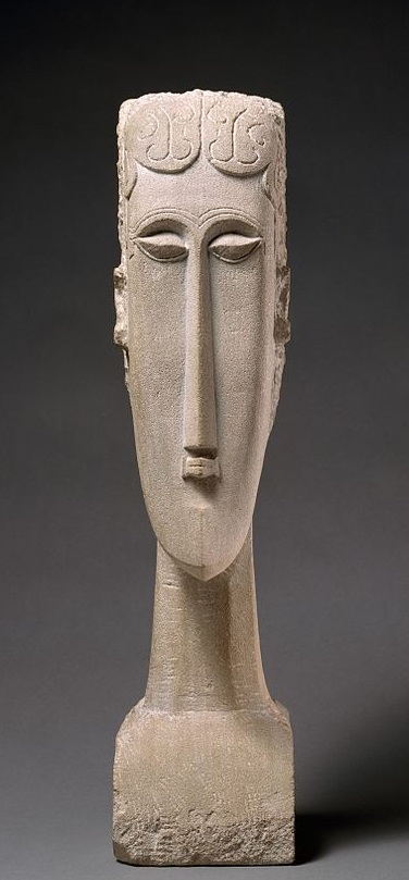 Tête de femme, 1912, calcaire, 68 x 16 x 24 cm, New York, Metropolitan Museum of Art.